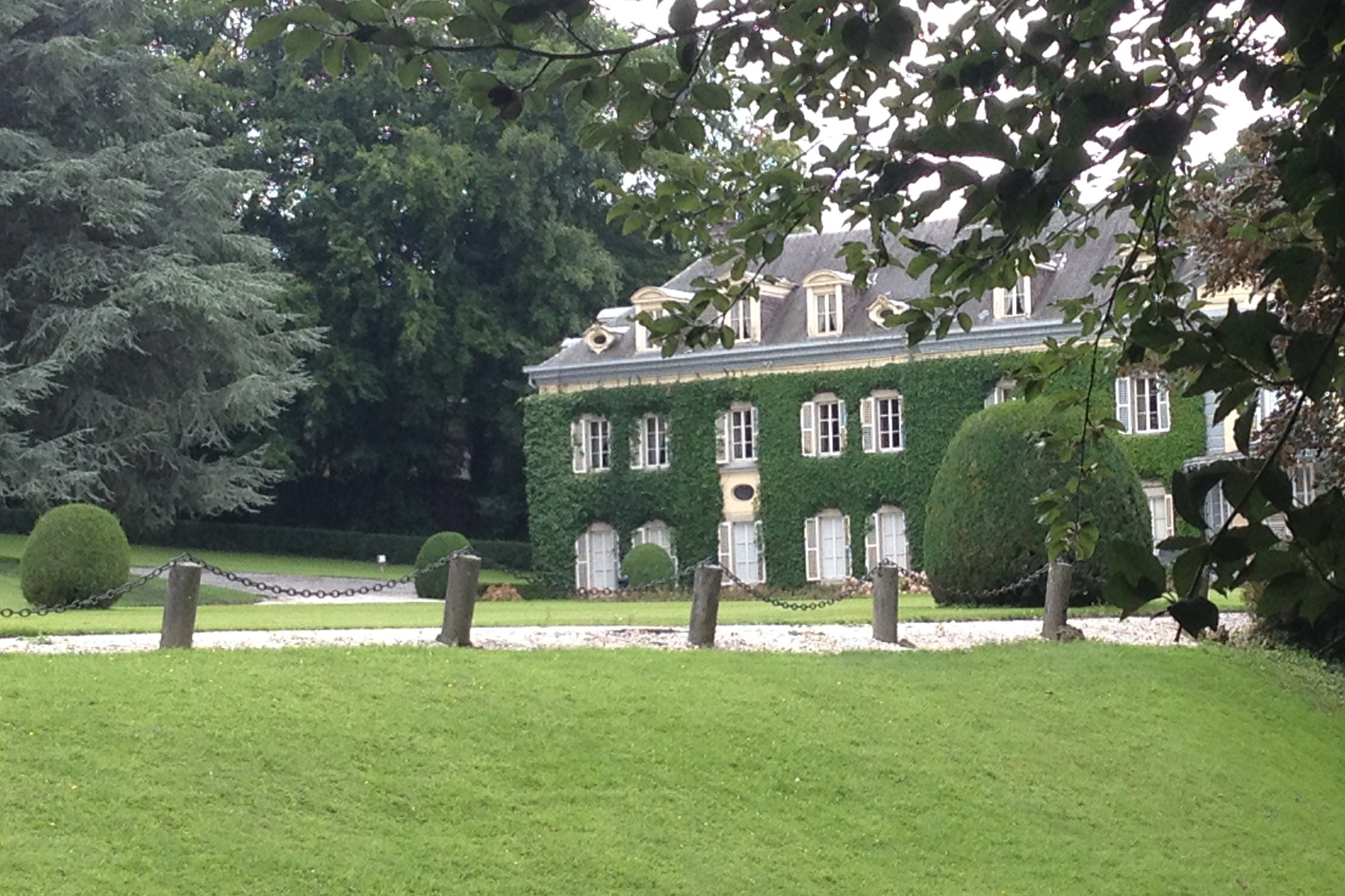 Noordgevel van het Kasteel van Argenteau